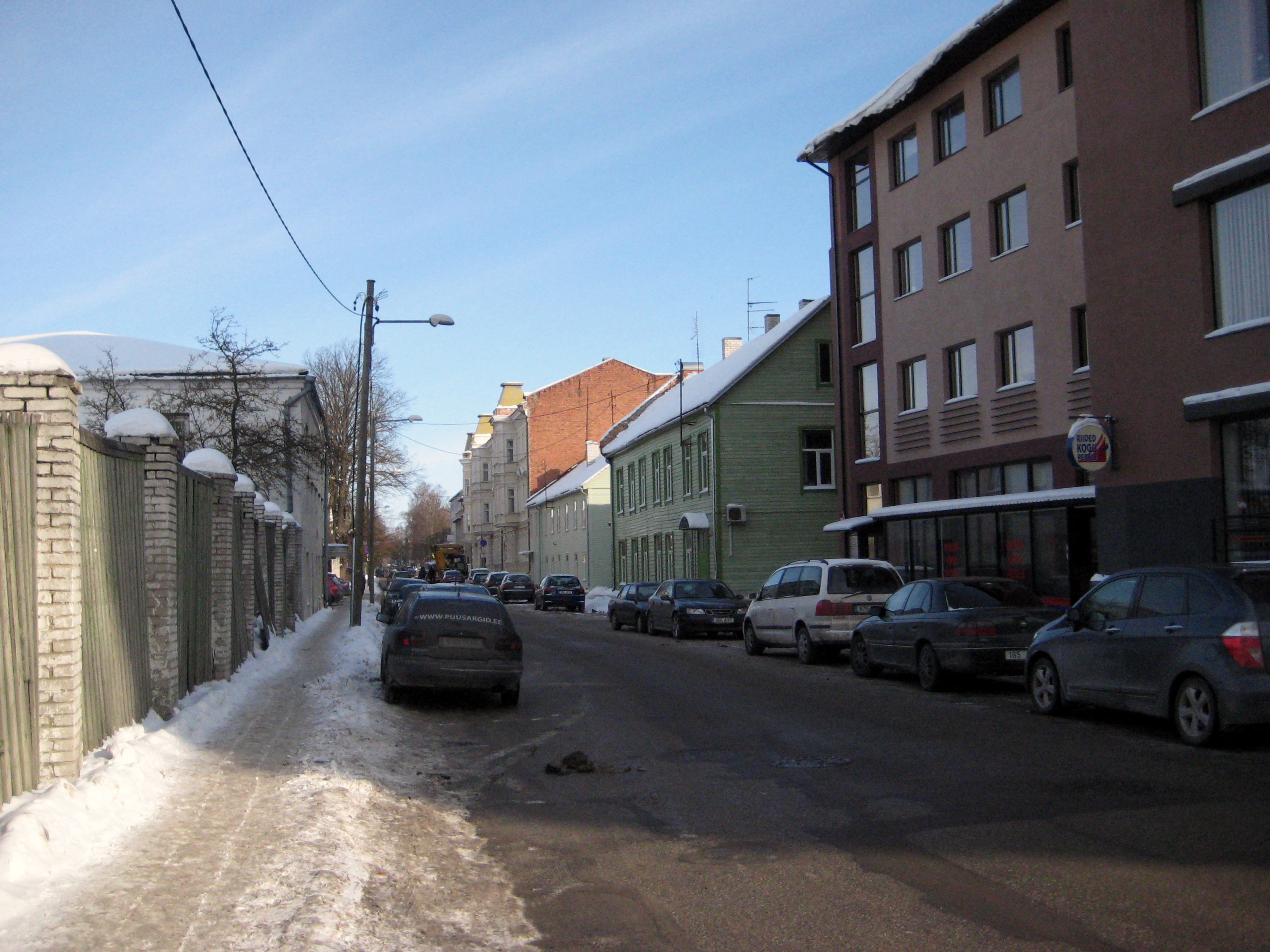 Tiigi tänava lõpp Vaksali tänaval, Tartu